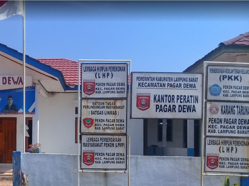 Kantor Peratin Pagardewa